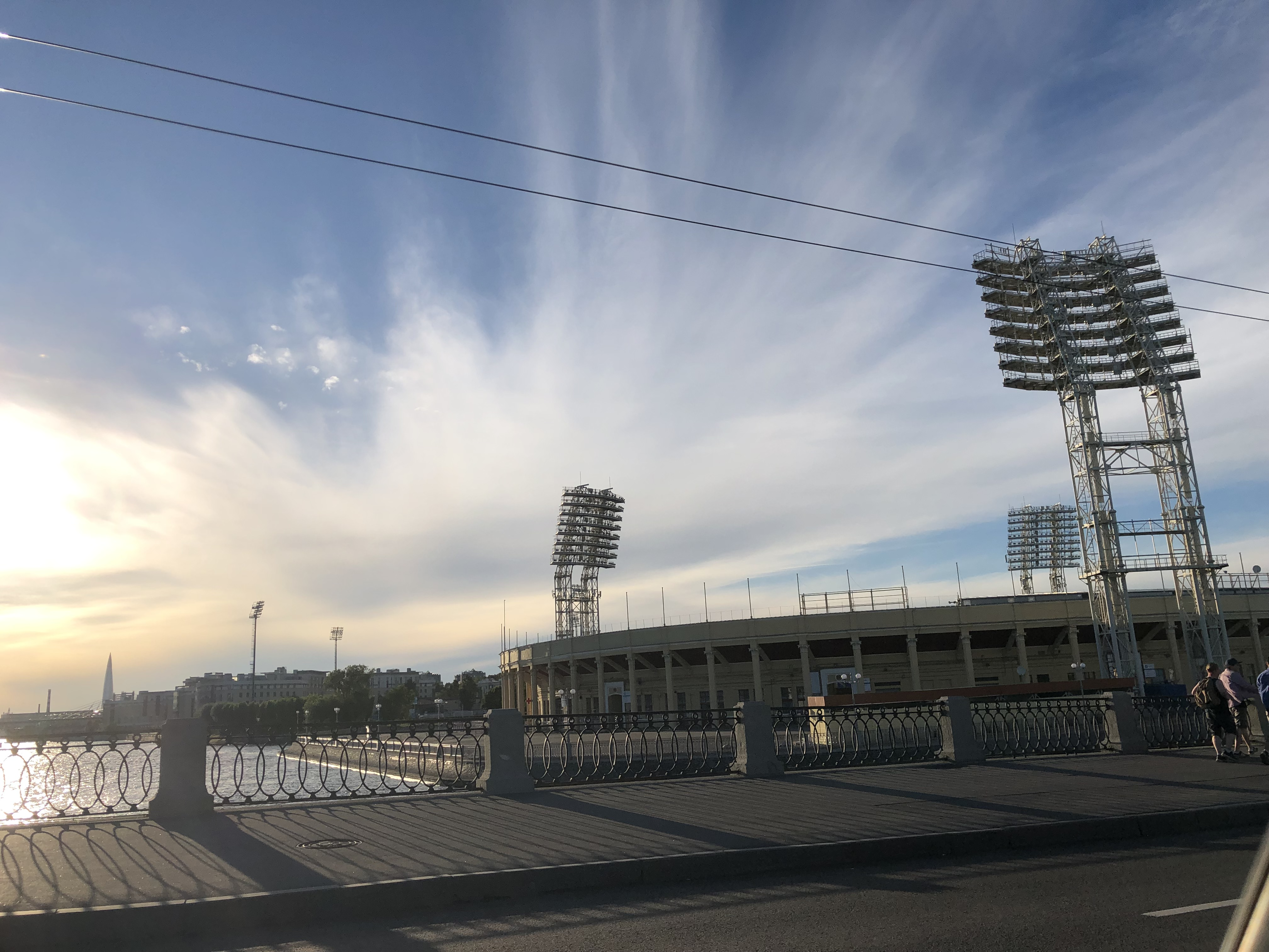 Стадион Петровский